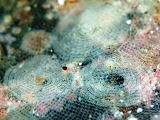 Okenia pilosa, puestas de huevos, a 5 m, Parque Marino de Izu, Japón